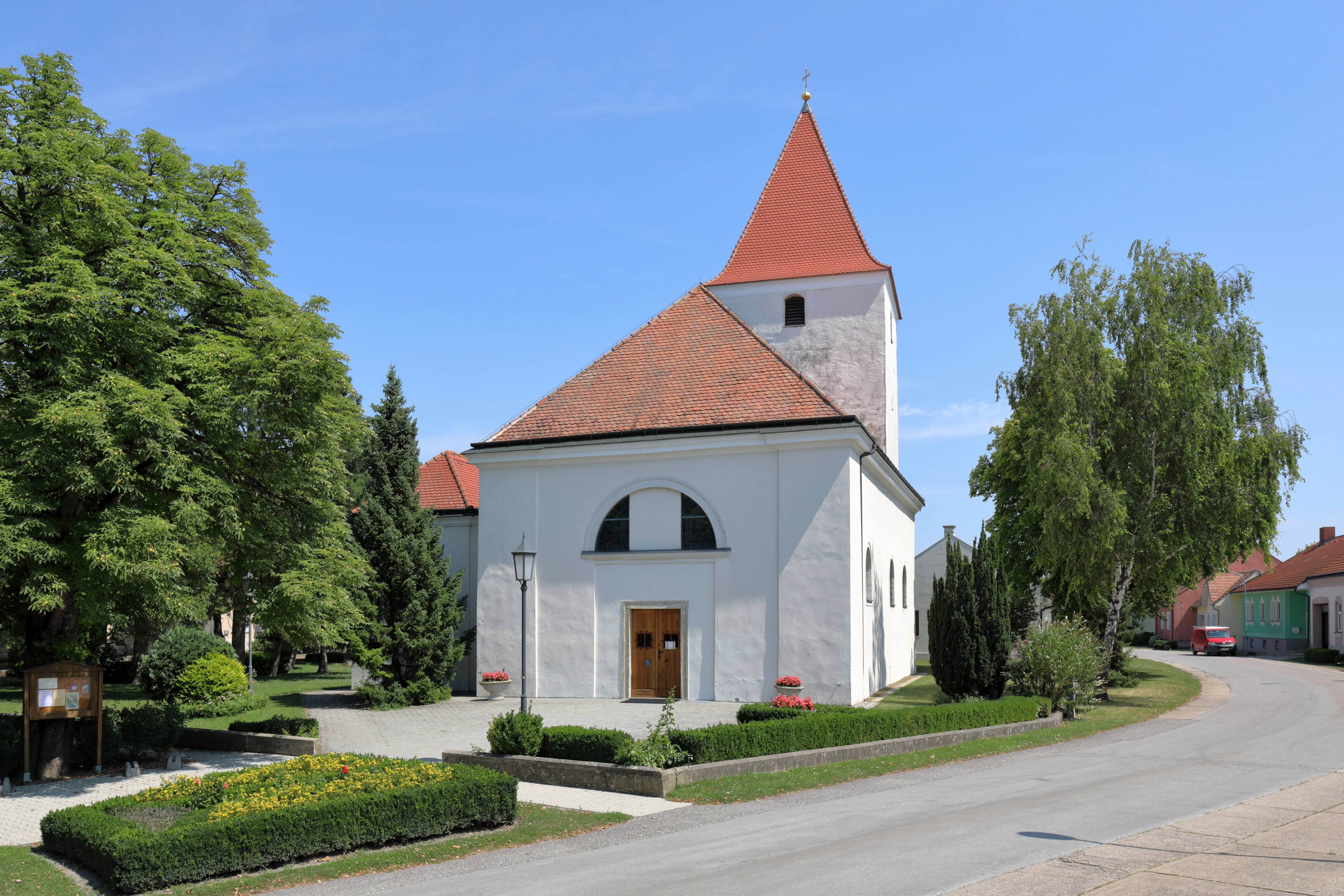 Westansicht der röm.-kath. Pfarrkirche hl. Laurenz in der niederösterreichischen Gemeinde Haringsee. Die ehemalige Wehrkirche wurde in mehreren Etappen barockisiert und Anfang des 19. Jahrhundert gegen Westen um ein Joch erweitert.